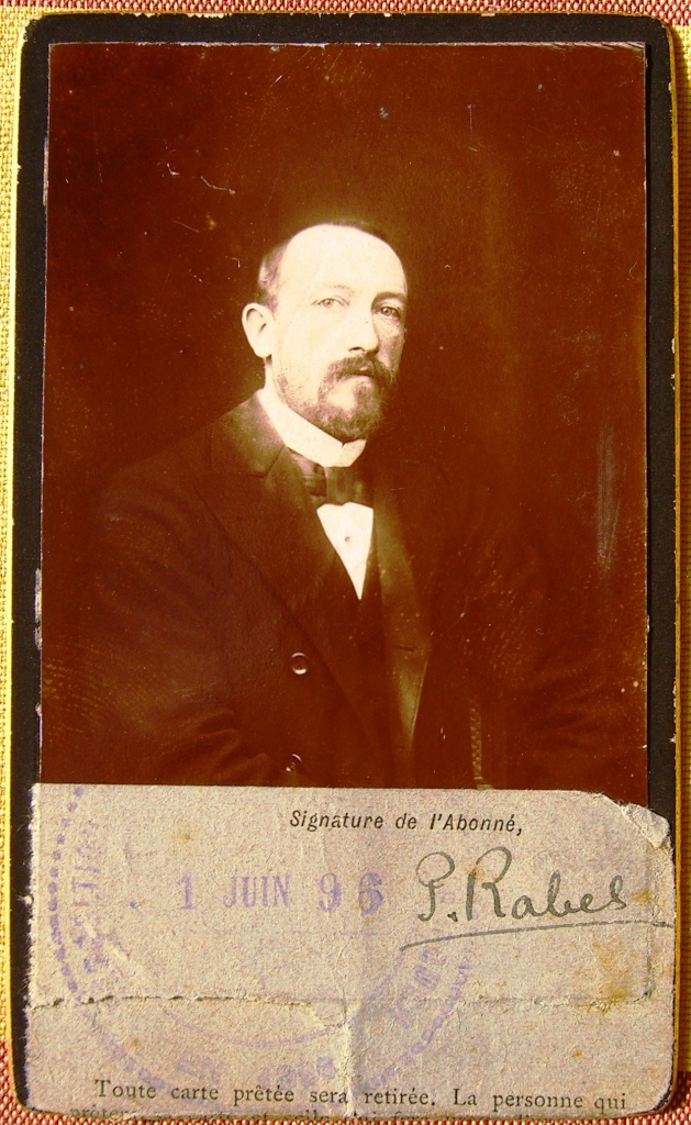 Pase para la Exposition Nationale & Coloniale de Rouen (Francia) de 1896 de Paul Rabel